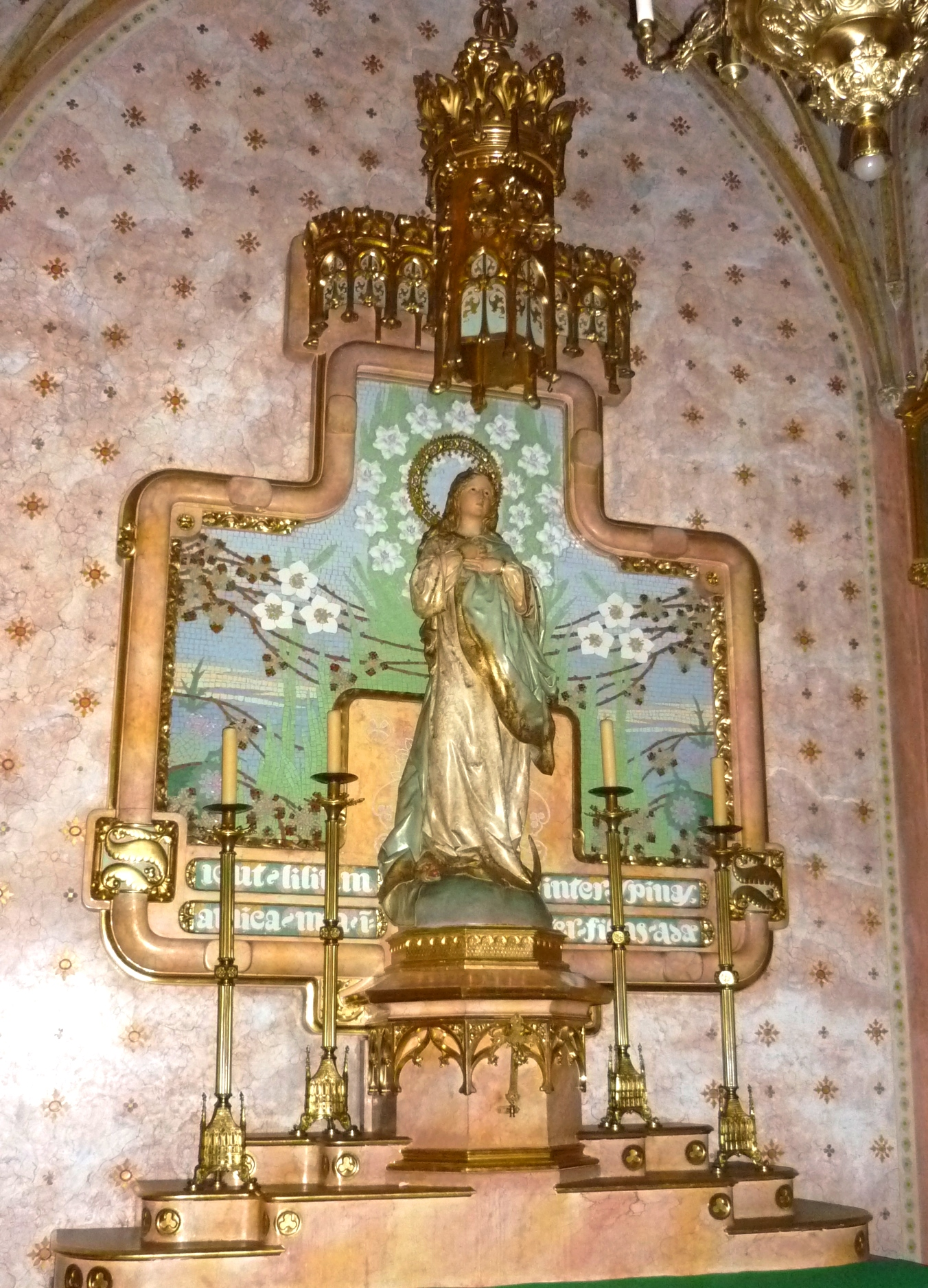 Altar lateral de l'església amb ara i retaule.